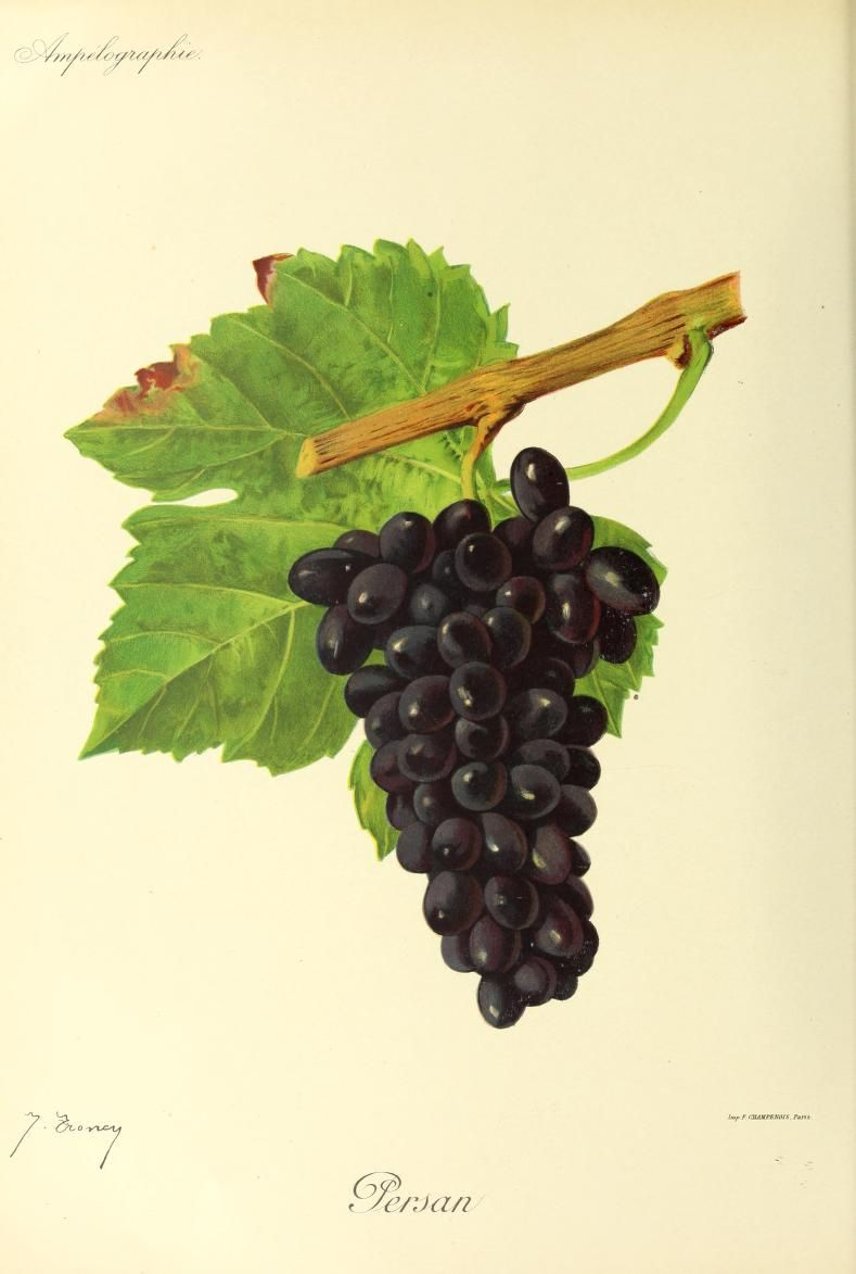 Illustration du cépage Persan par Jules Troncy dans l'ouvrage "Ampélographie : traité général de viticulture" publié sous la direction de P. Viala & V. Vermorel avec la collaboration de A. Bacon, A. Barbier, A. Berget [et al.] - Date de l'édition originale : 1901-1910